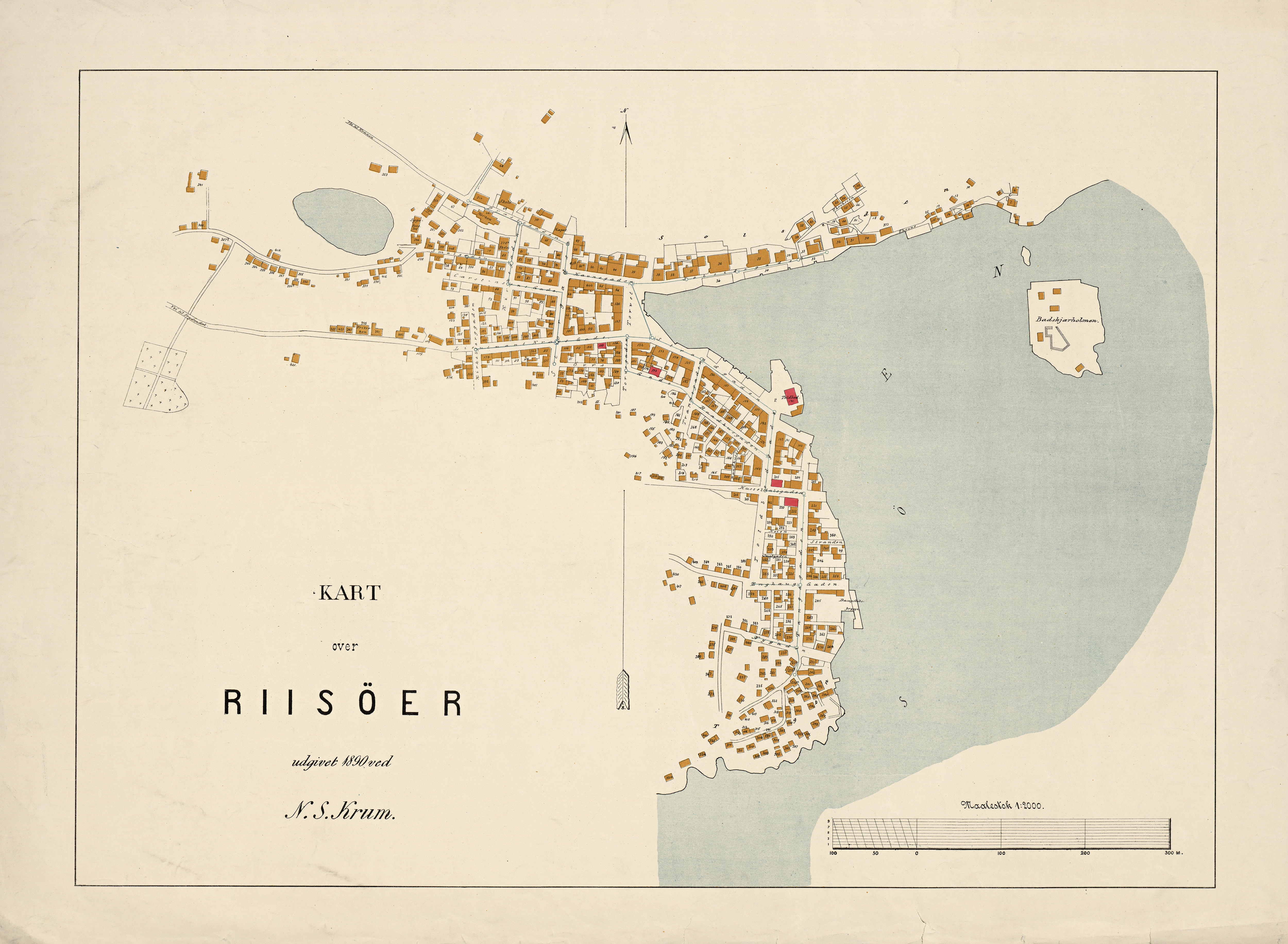 Kart over Risør (1890)